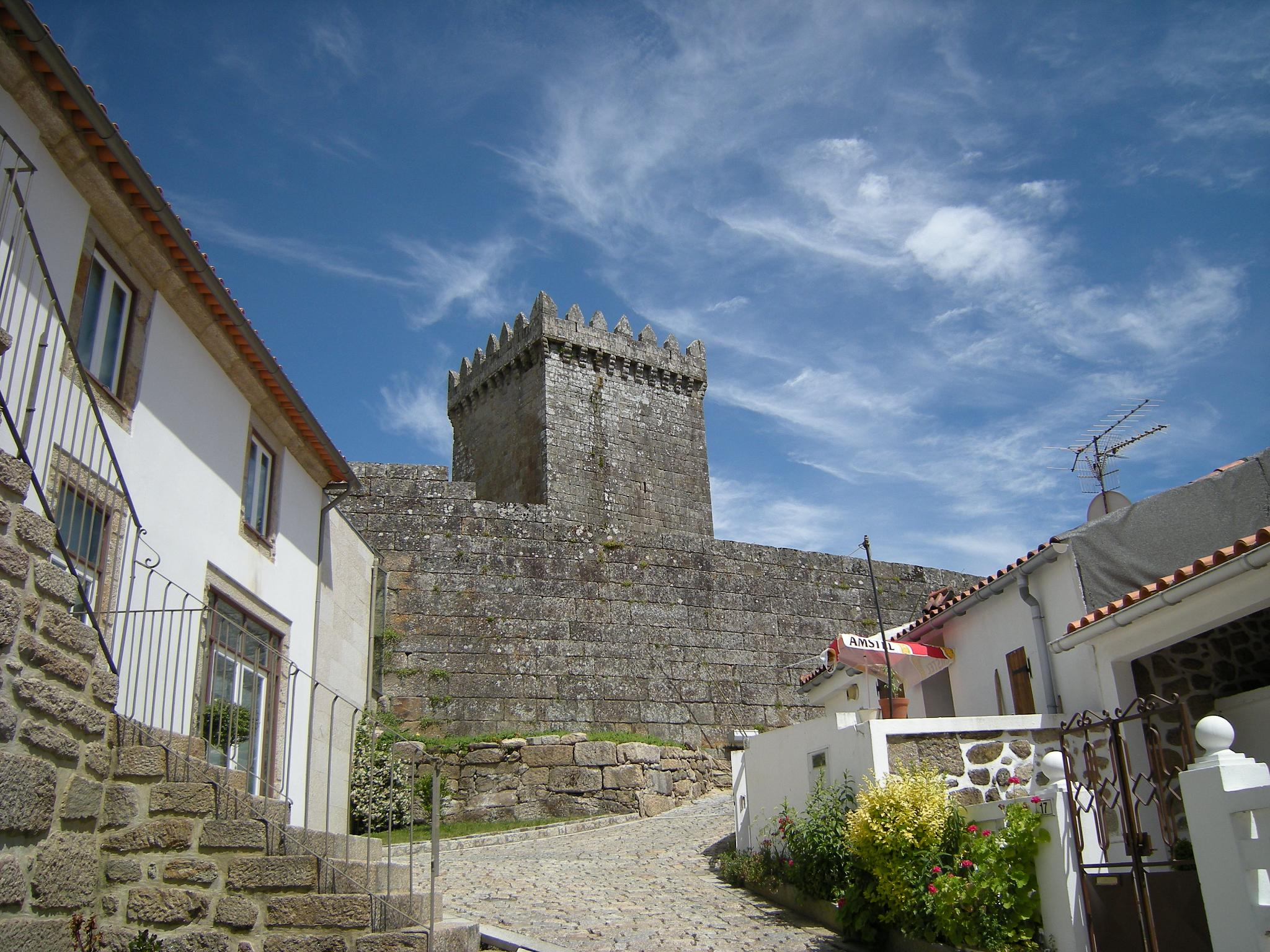 pt: Torre de Menagem. Castelo de Melgaço.